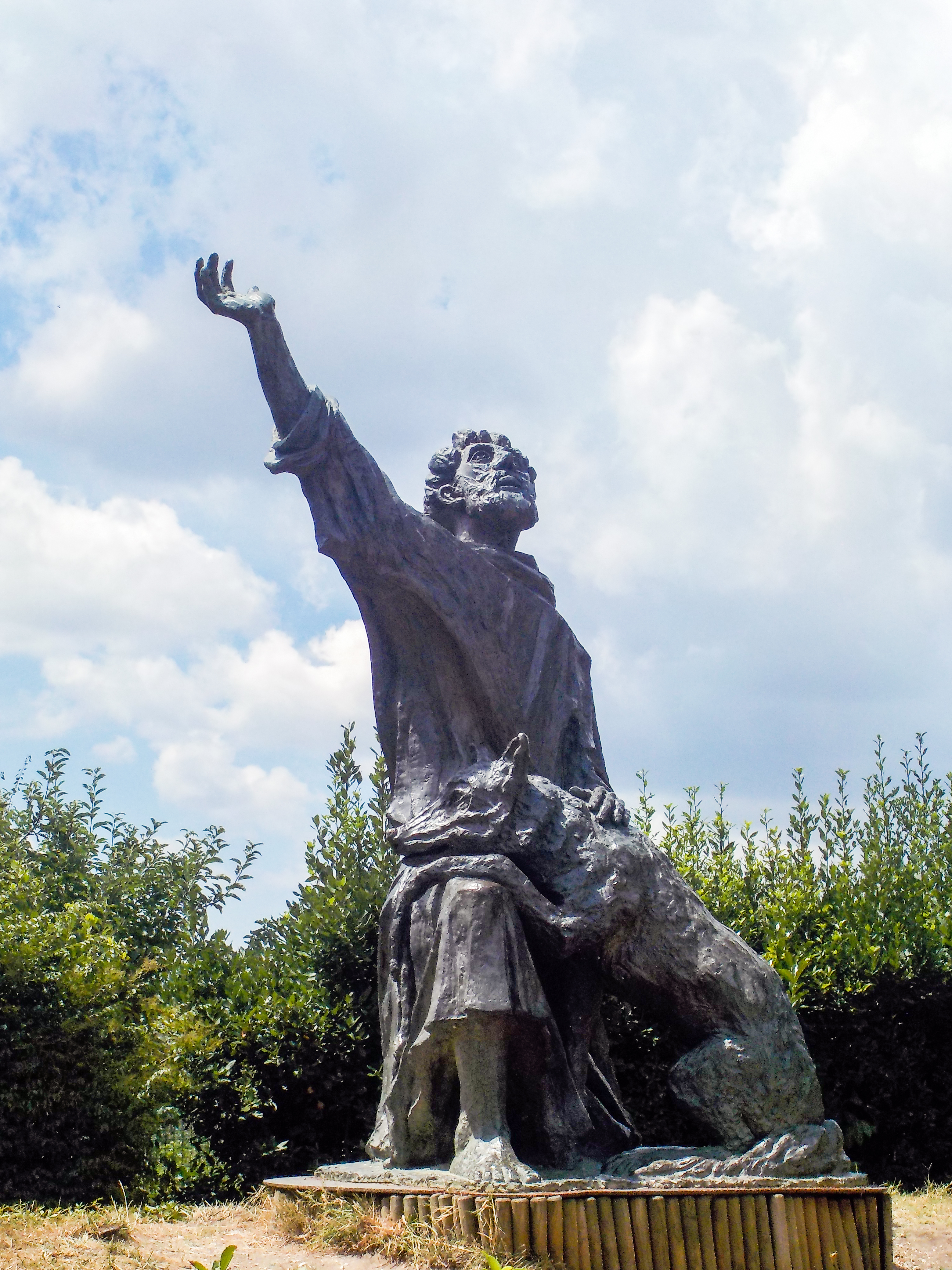 L'amore ampio, statua di San Francesco ed il lupo di Gubbio, opera dello scultore Roberto Bellucci a Gubbio, Italia This photo has been taken in the country: Italy